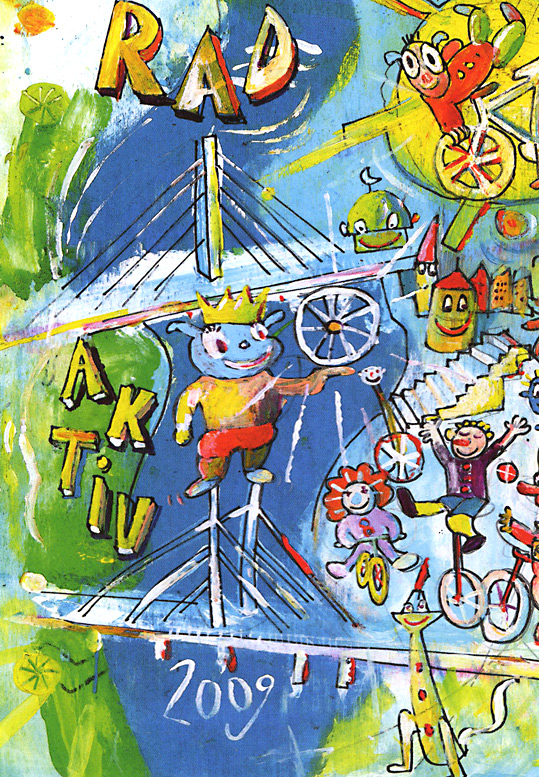 Fahrradtag in Düsseldorf 27 Juni 2009. (Foto from Reklame). ru: День Велосипеда в Дюссельдорфе, 2009. Фотография с рекламы.